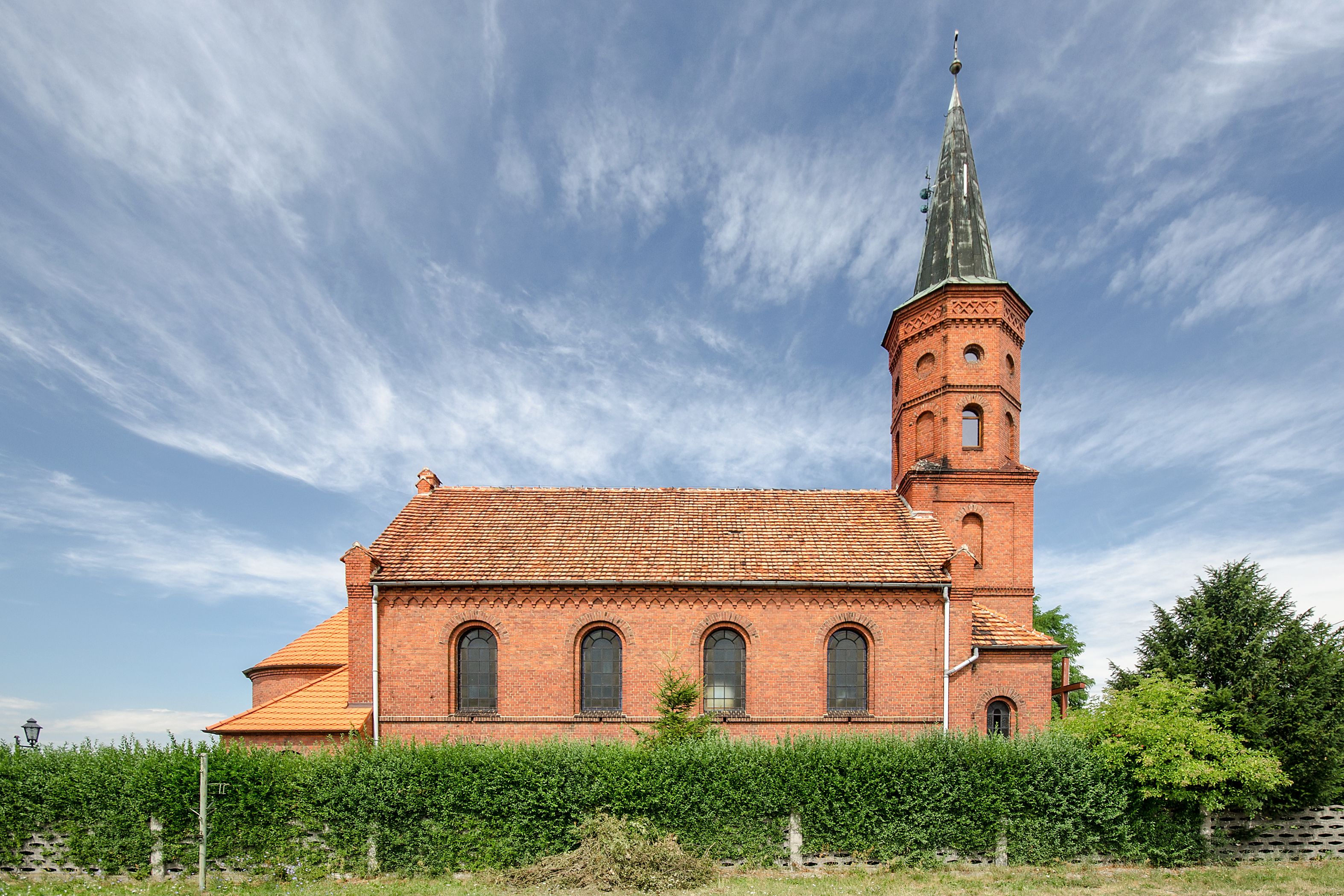 Kościół Niepokalanego Poczęcia Najświętszej Maryi Panny w Małowicach, woj. dolnośląskie, pow. wołowski, gm. Wińsko